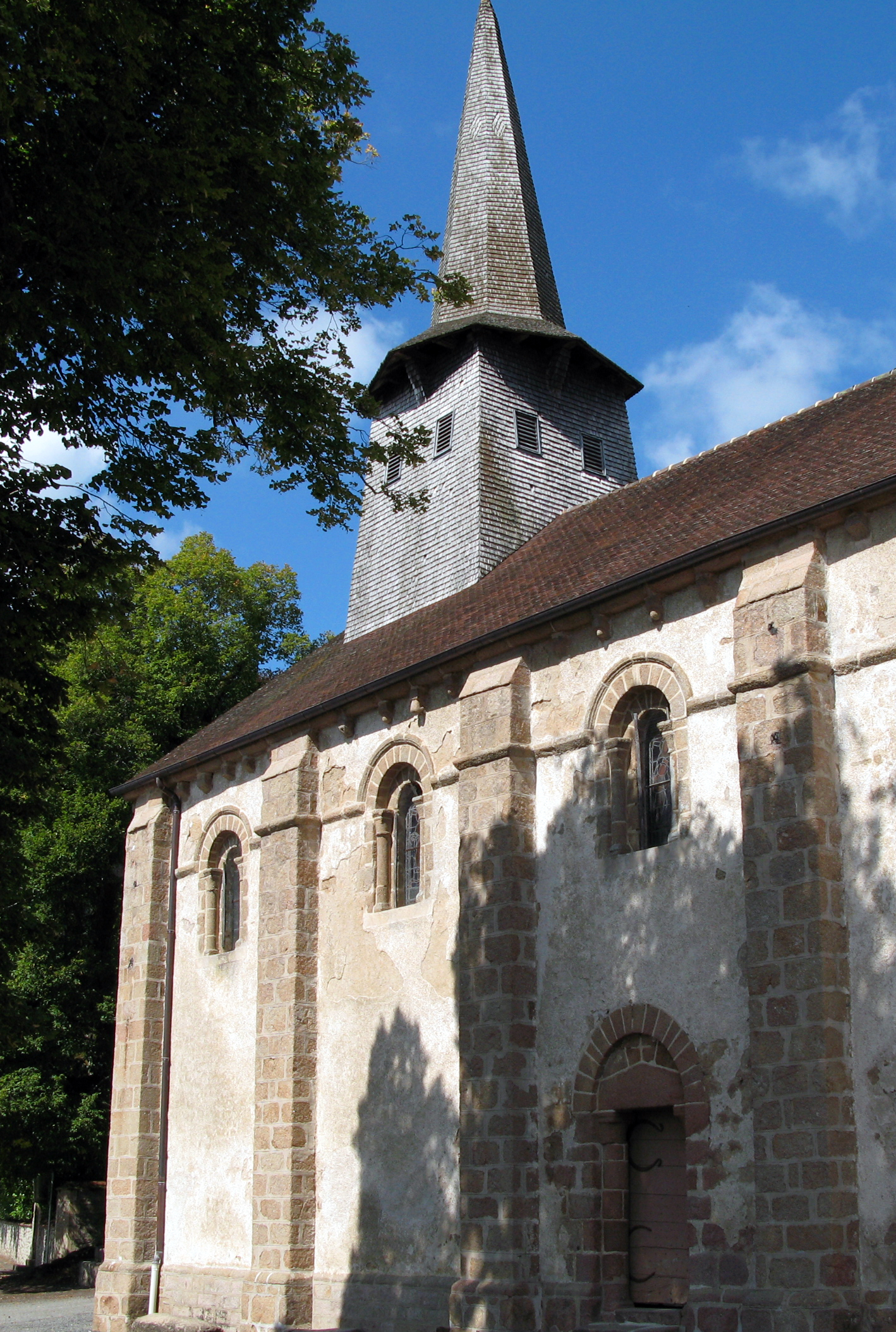 Nouziers (Creuse, France) - La façade Sud de l'église. . .